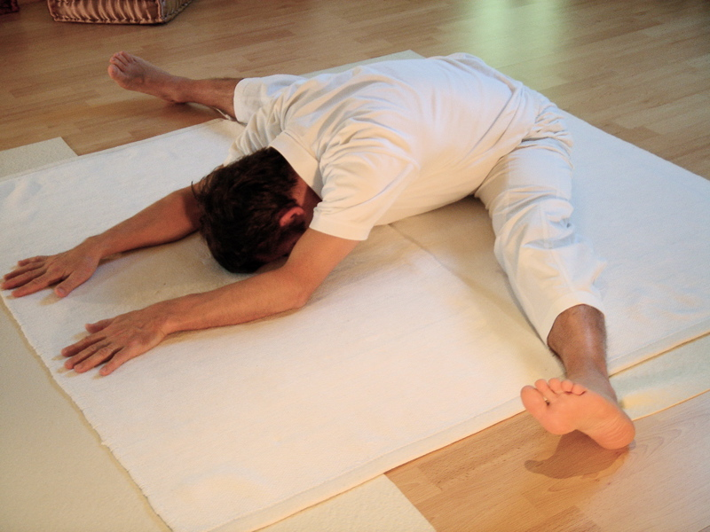 Yoga posture Upavistha Konasana (IAST: Upaviṣṭa Koṇāsana)